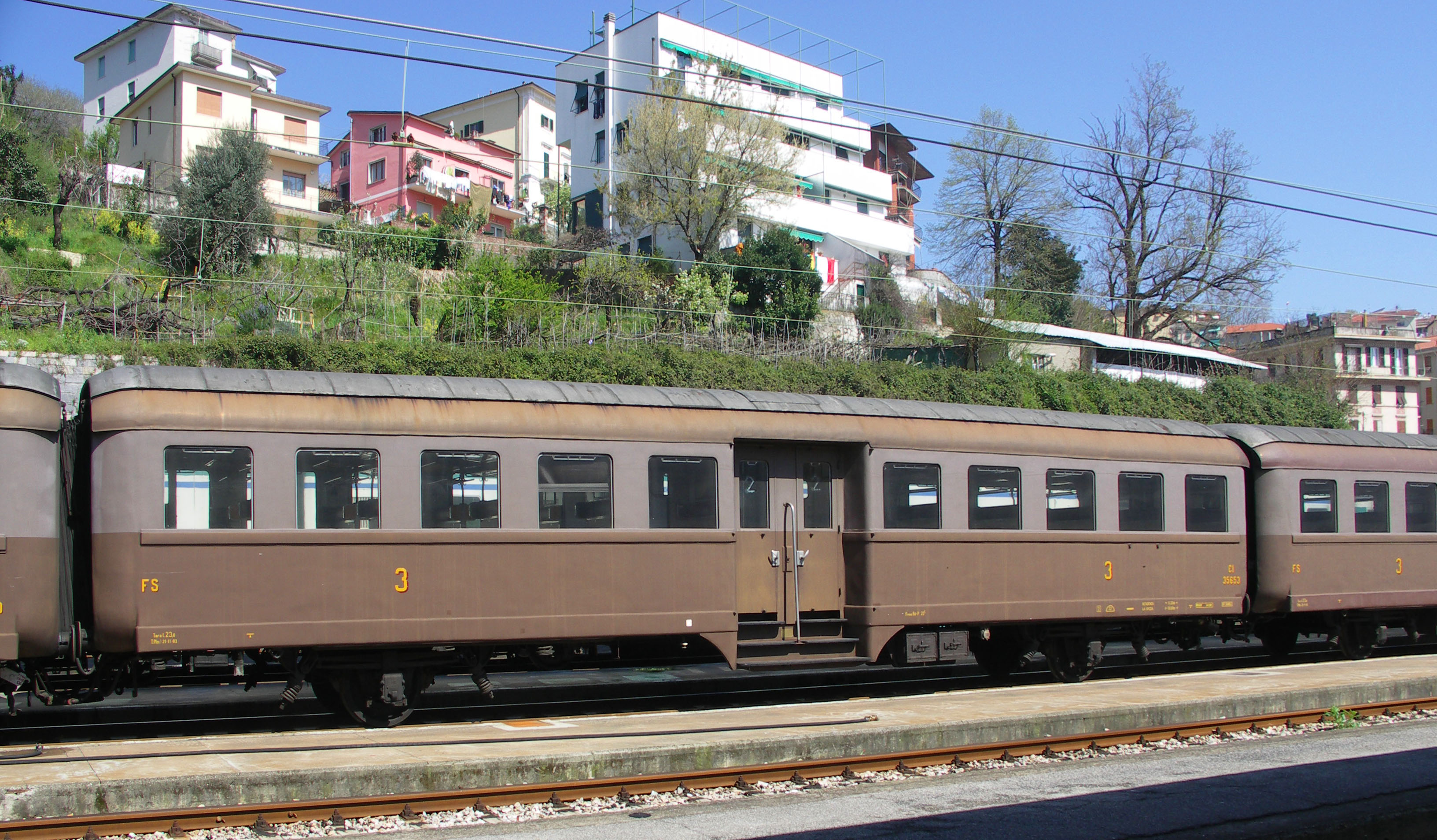 Carrozza di 3° classe FS CI 35653 Corbellini a La Spezia C.le il 2/4/2011